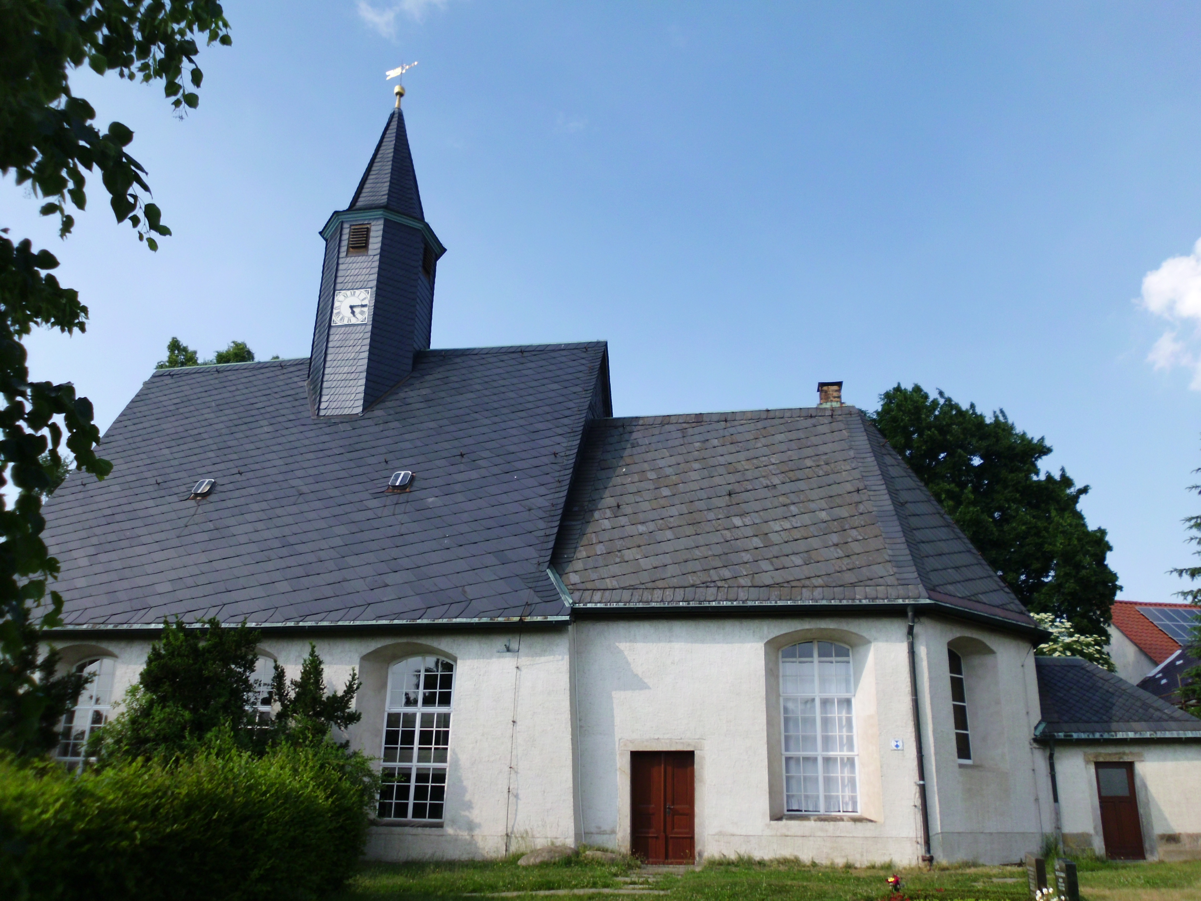 Evangelisch-Lutherische Kirche Seeligstadt. Erbaut 1749-50